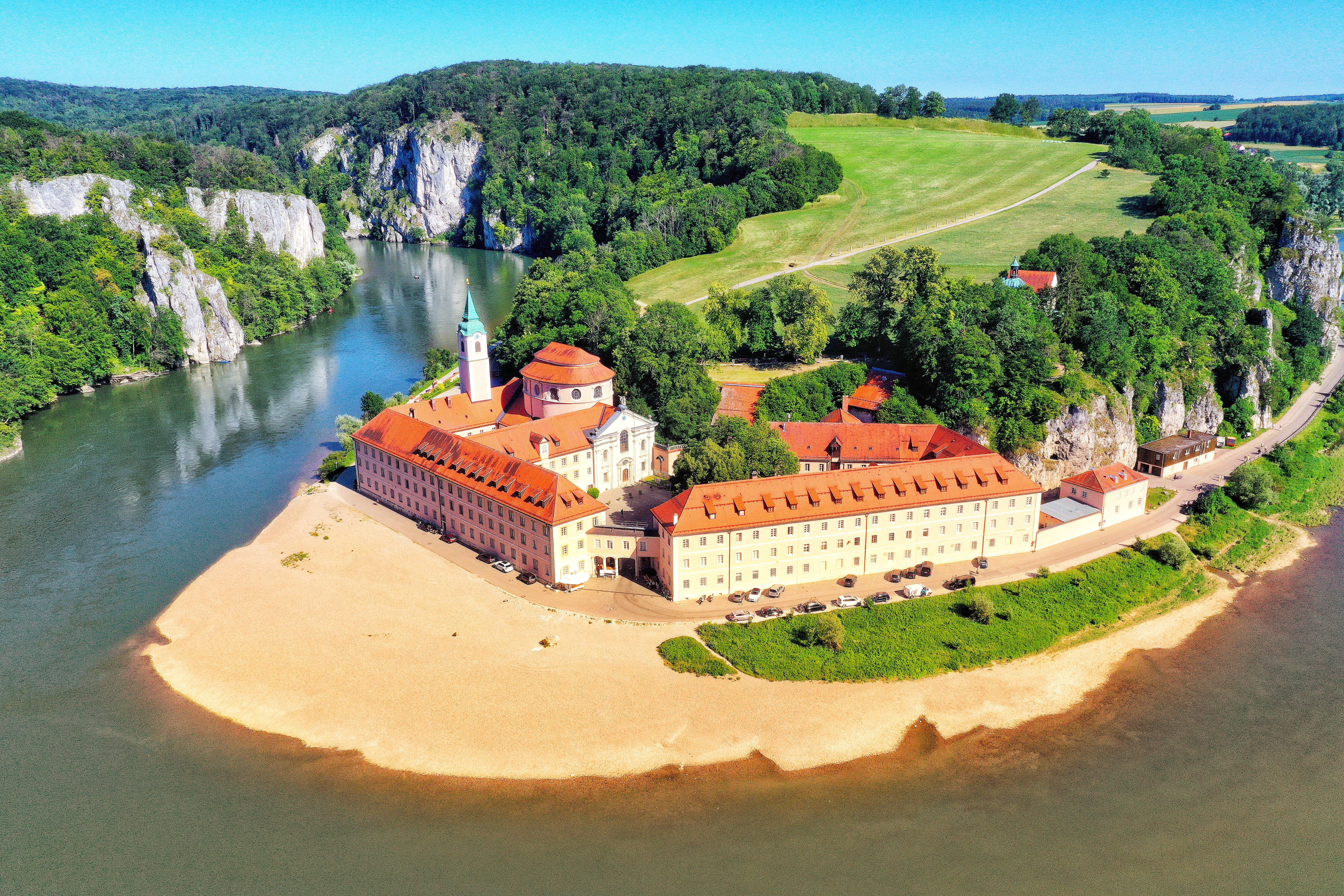 Das Kloster Weltenburg ist eine Benediktinerabtei in Weltenburg, einem Ortsteil von Kelheim an der Donau in Niederbayern.